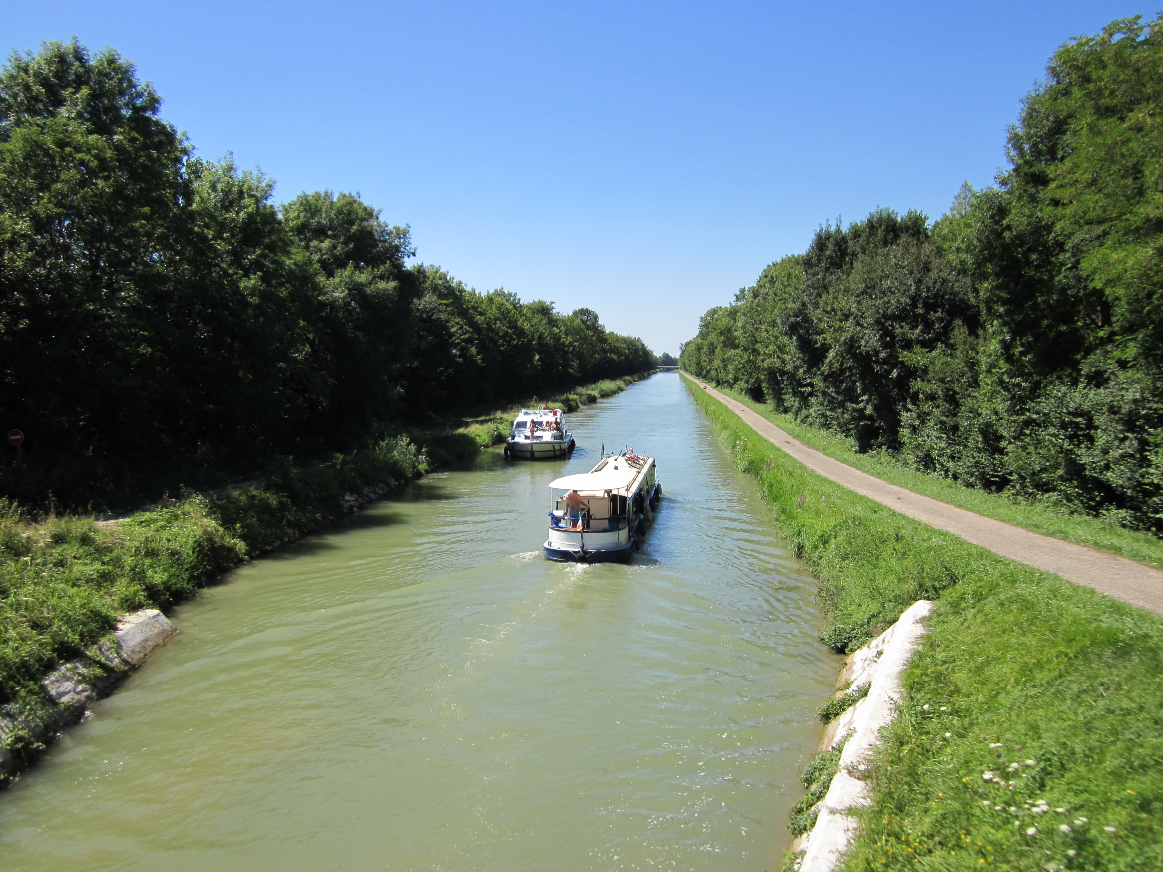 Canal du Rhône au Rhin - navigation de plaisance (près de Damparis - Jura)- Note : chemin de halage aménagé en piste cyclable (EuroVelo 6])